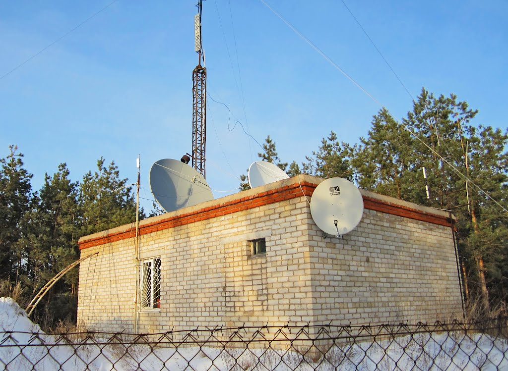 Ишимбайский телецентр в парке им. В. Н. Полякова